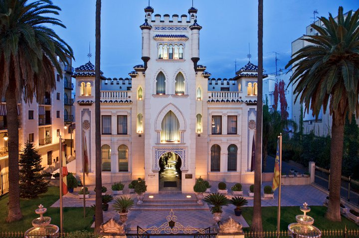 Edifici del Hotel Kazar en avinguda 2 de maig número 117, Ontinyent (Valéncia).